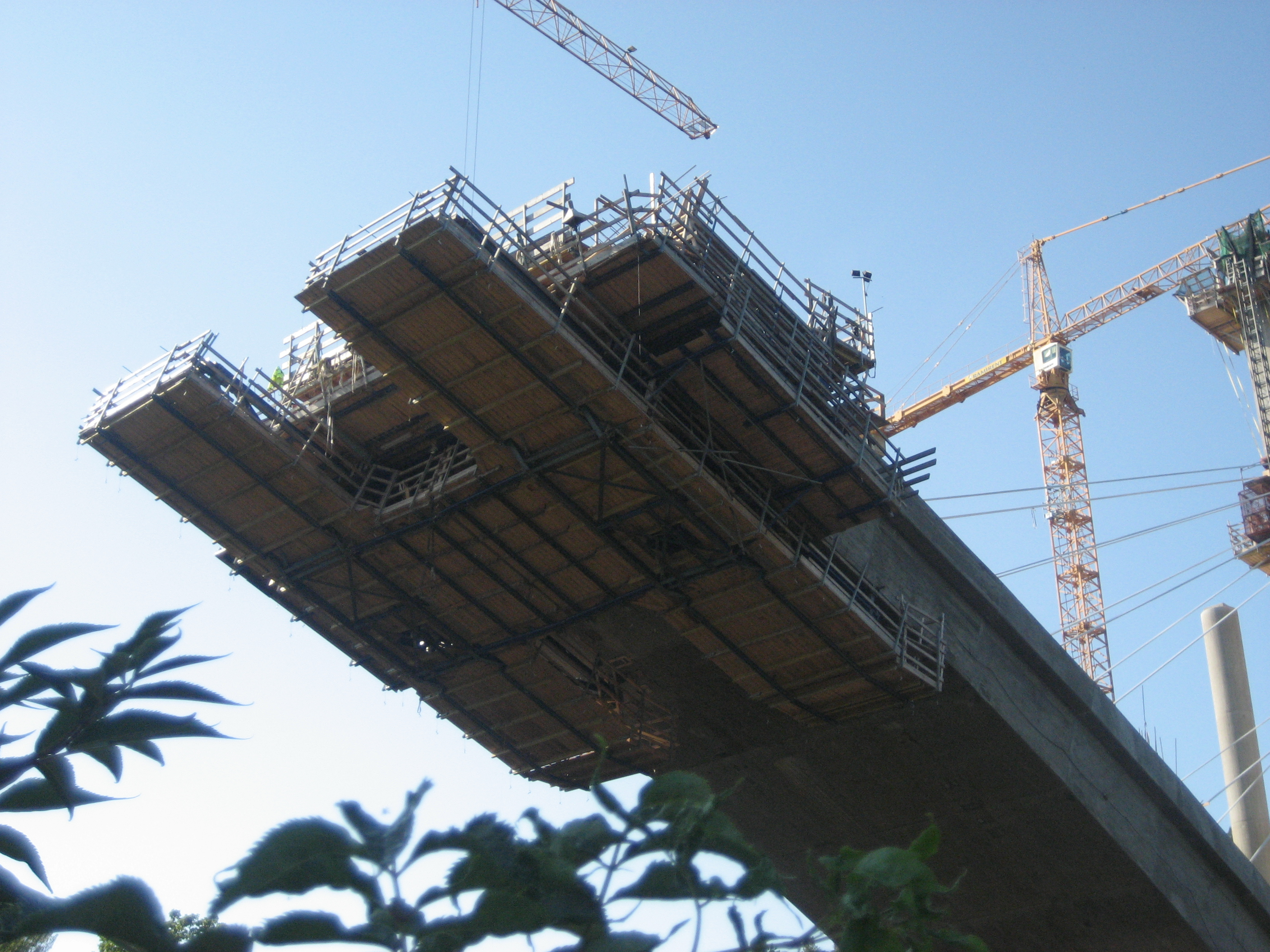 Image Ørekils Bridge